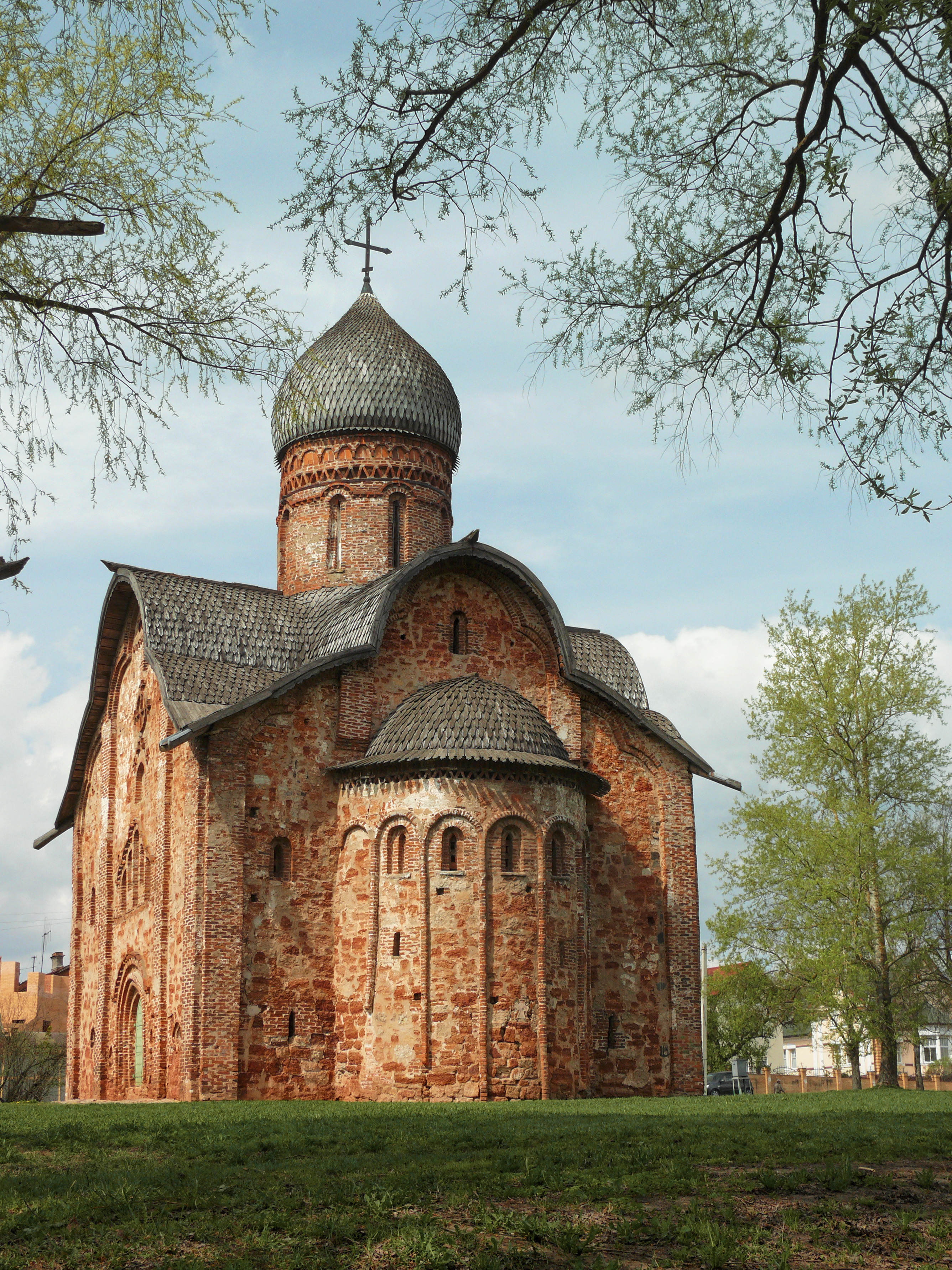 Церковь Петра и Павла в Кожевниках: улица Зверинская, 4, Великий Новгород, Новгородская область